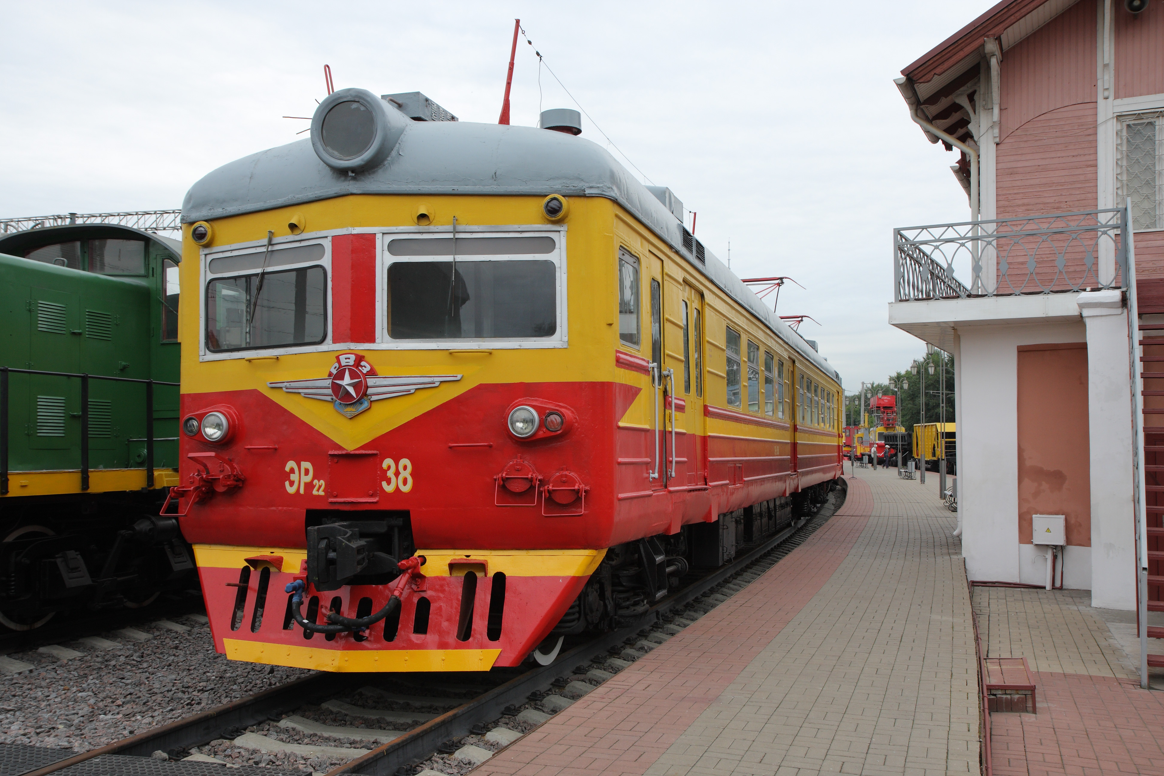 Электропоезд ЭР22 38